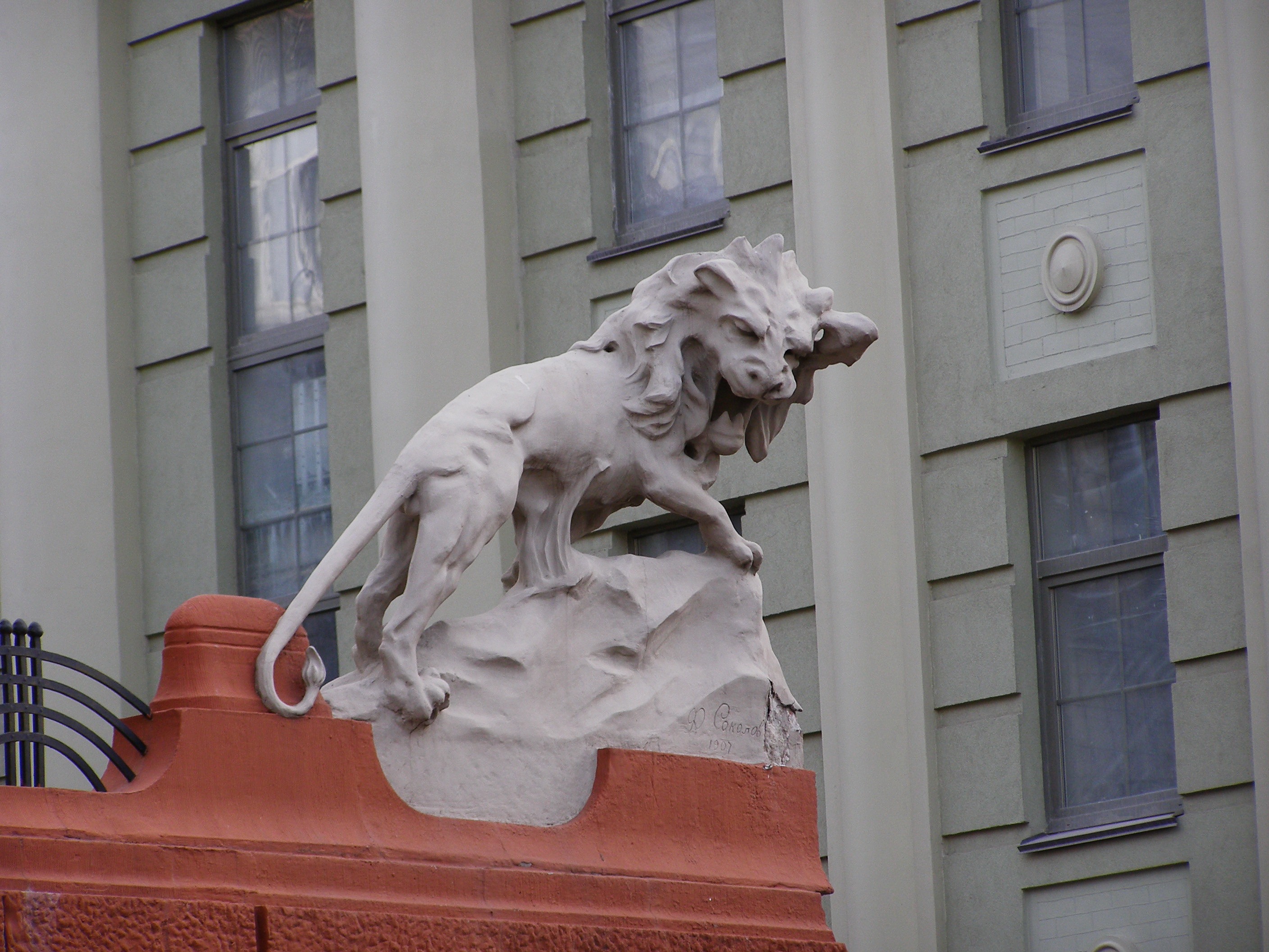 Скульптурные украшения клиники Качковского